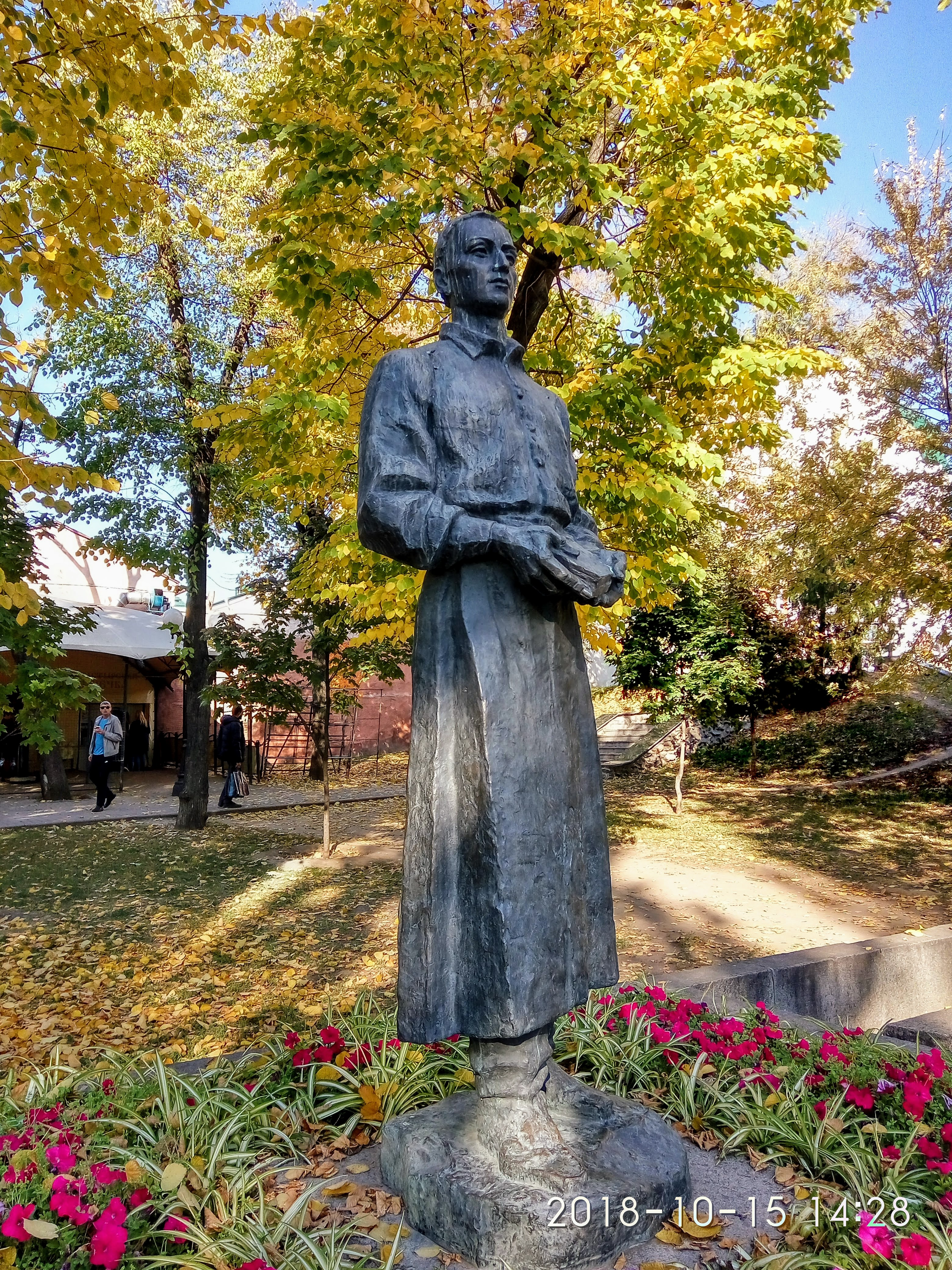 Пам'ятник Григорію Сковороді (Харків, Покровський сквер)